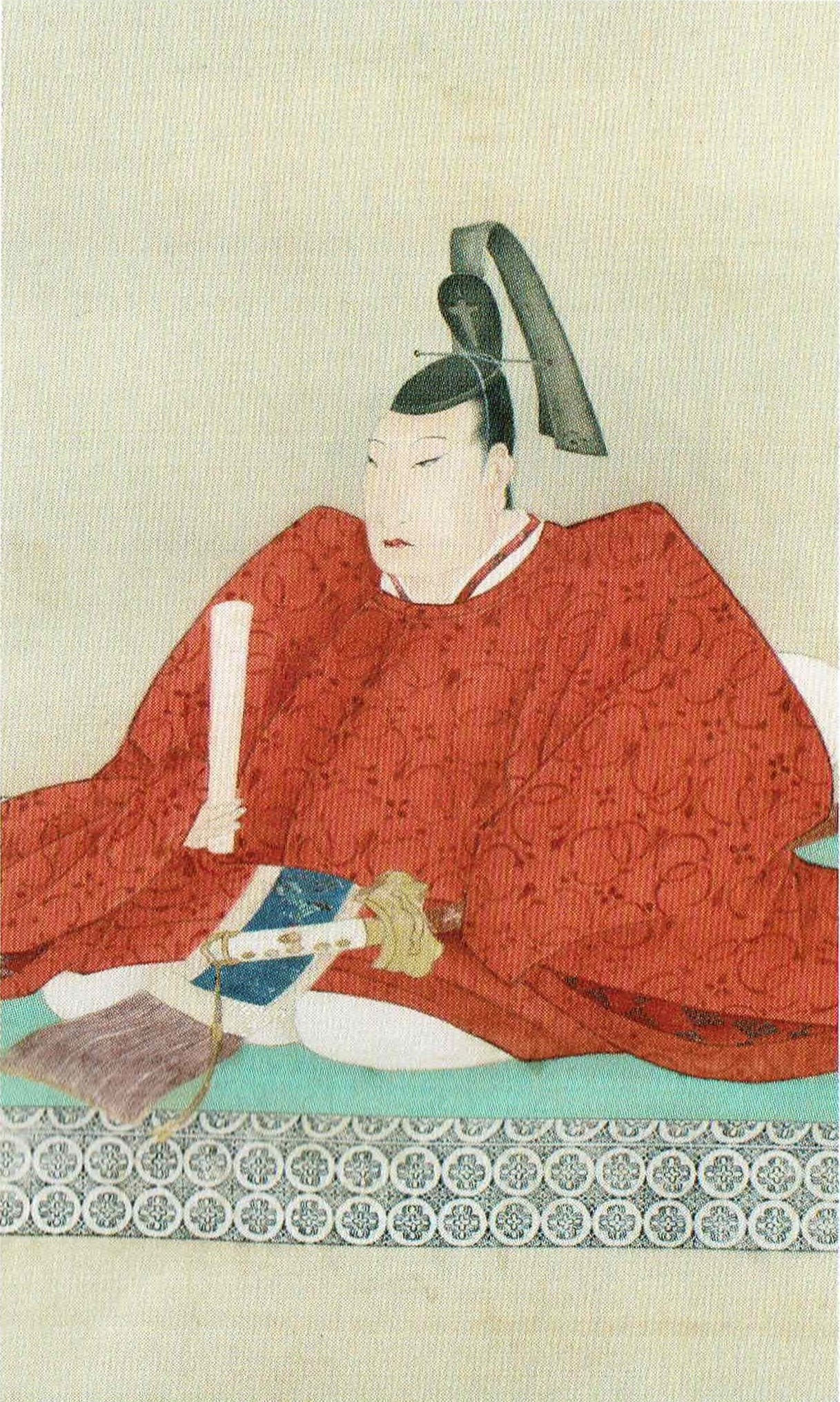 奥平昌鹿の肖像。